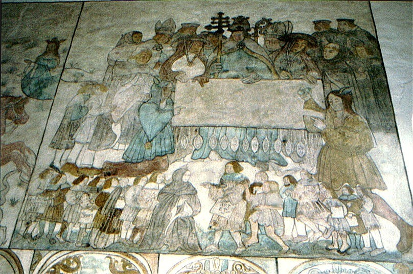 Brøns Kirke i Danmark. Skib nordvæg, Afladshandel